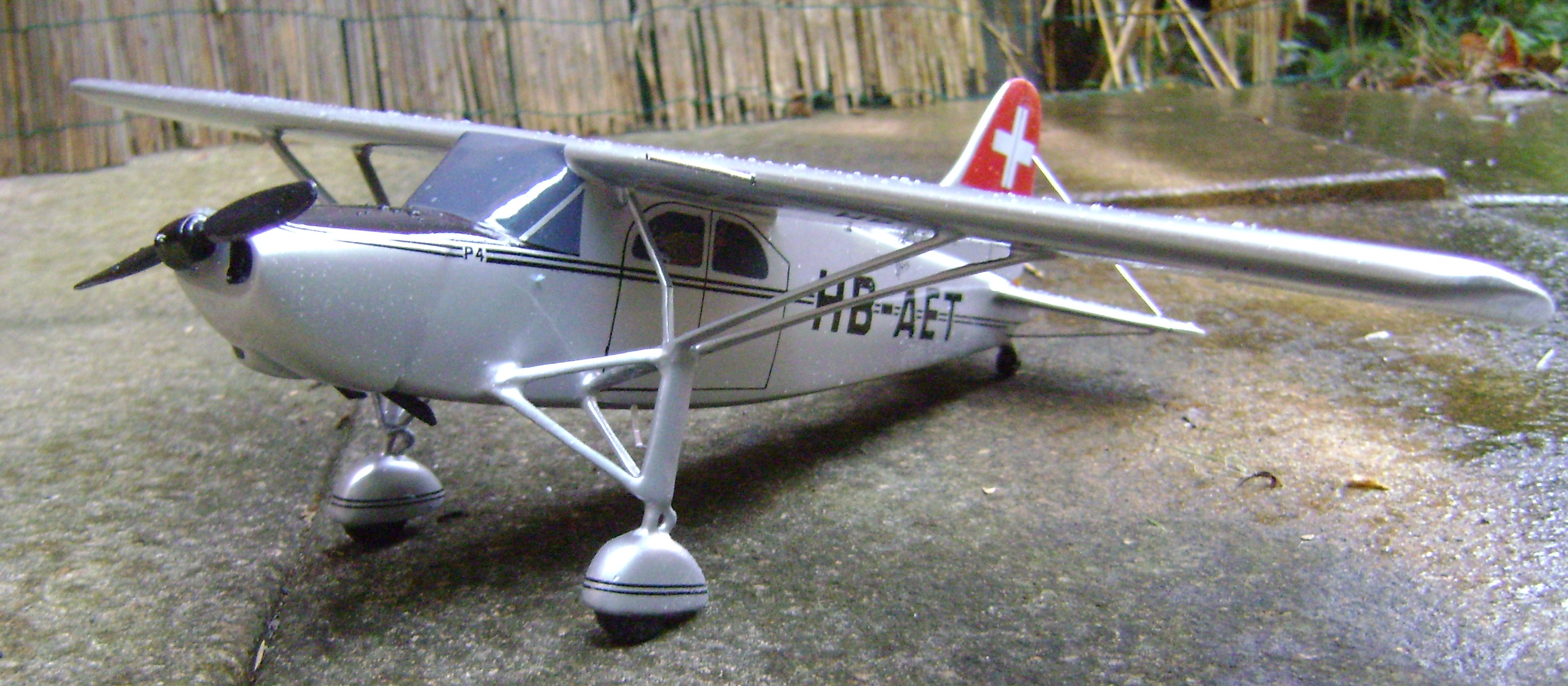 PilatusP4frontseite